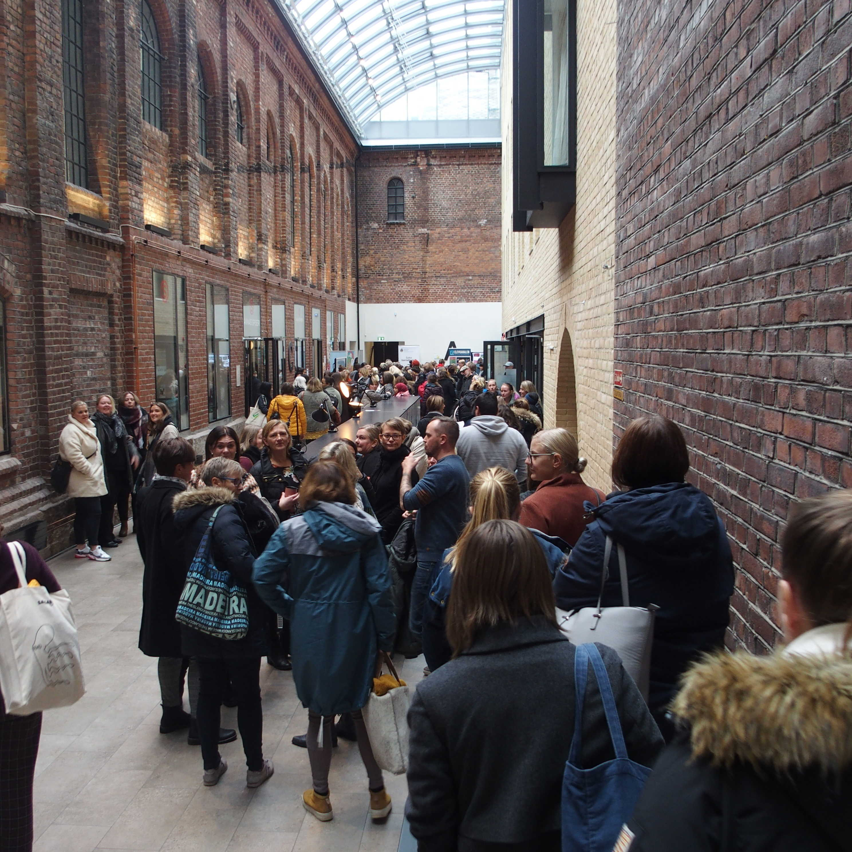 Når flere tusen deltakere skal forflytte seg fra et kurs til et annet, blir gangene i gamle Frydenlund bryggeri trange.